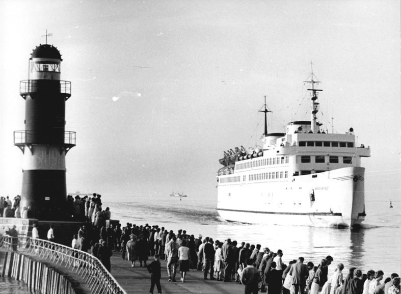 Warnemünde, Mole, Leuchtturm, Fährschiff ADN-ZB Sindermann 30.9.1973 Bez. Rostock: 70 Jahre Fährlinie Warnemünde-Gedser. Auf der Fährschifflinie DDR-Dänemark mit ihrer ausgedehnten Transitverbindung begehen Mitarbeiter des Fährbetriebes am 30.9.73 den 70. Jahrestag der Aufnahme des ständigen Eisenbahnfährverkehrs zwischen Rostock- Warnemünde und Gedser. Das große DDR-Fährschiff "Warnemünde" (unser Photo) kann auf seinen drei Eisenbahngleisen jeweils 31 Güterwagen oder insgesamt 150 PKW über die Ostsee bringen. (Archivphoto 1972)